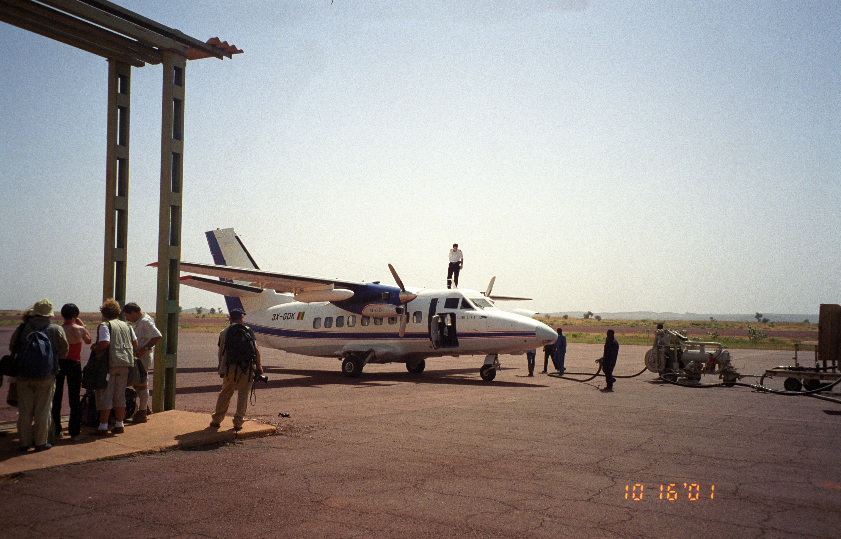 Mopti Airport, Mali, aircraft:Let L-410